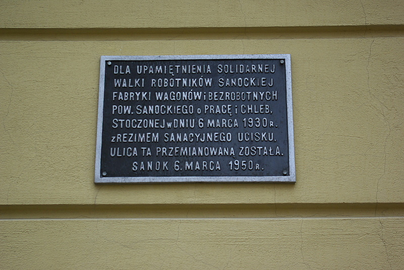 Tablica na budynku przy ul. Piłsudskiego 2 w Sanoku, dla upamiętnienia protestu robotników "Marsz Głodnych" z dnia 6 marca 1930. Odsłonięta 6 marca 1950 i w tym dniu przemianowana ulica na "6 Marca". Tablicę wykonał Władysław Kandefer.